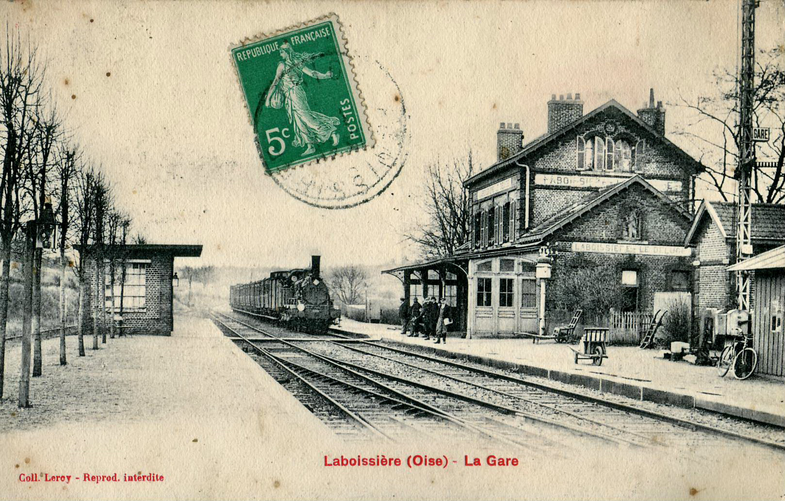 Carte postale ancienne éditée par LeroyLABOISSIERE (Oise) : la gare